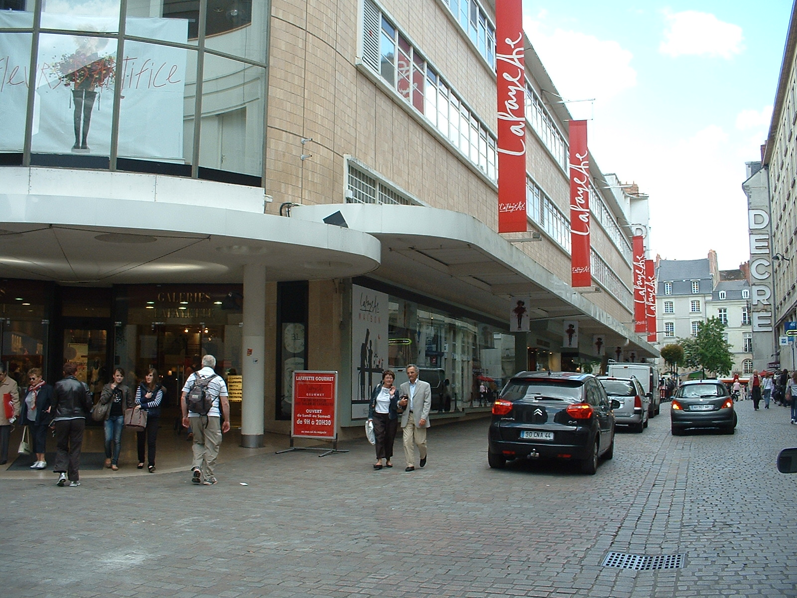 Nantes (Loire-Atlantique, France) - rue de la Marne